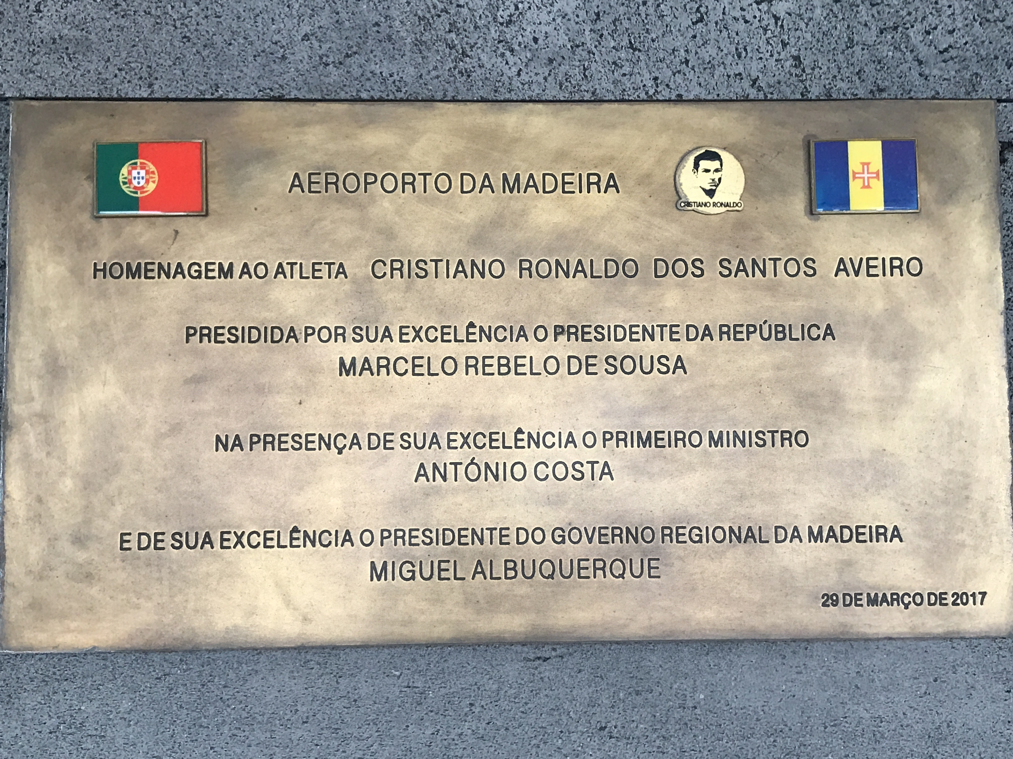 Gedenktafel zur Umbenennung des Flughafens